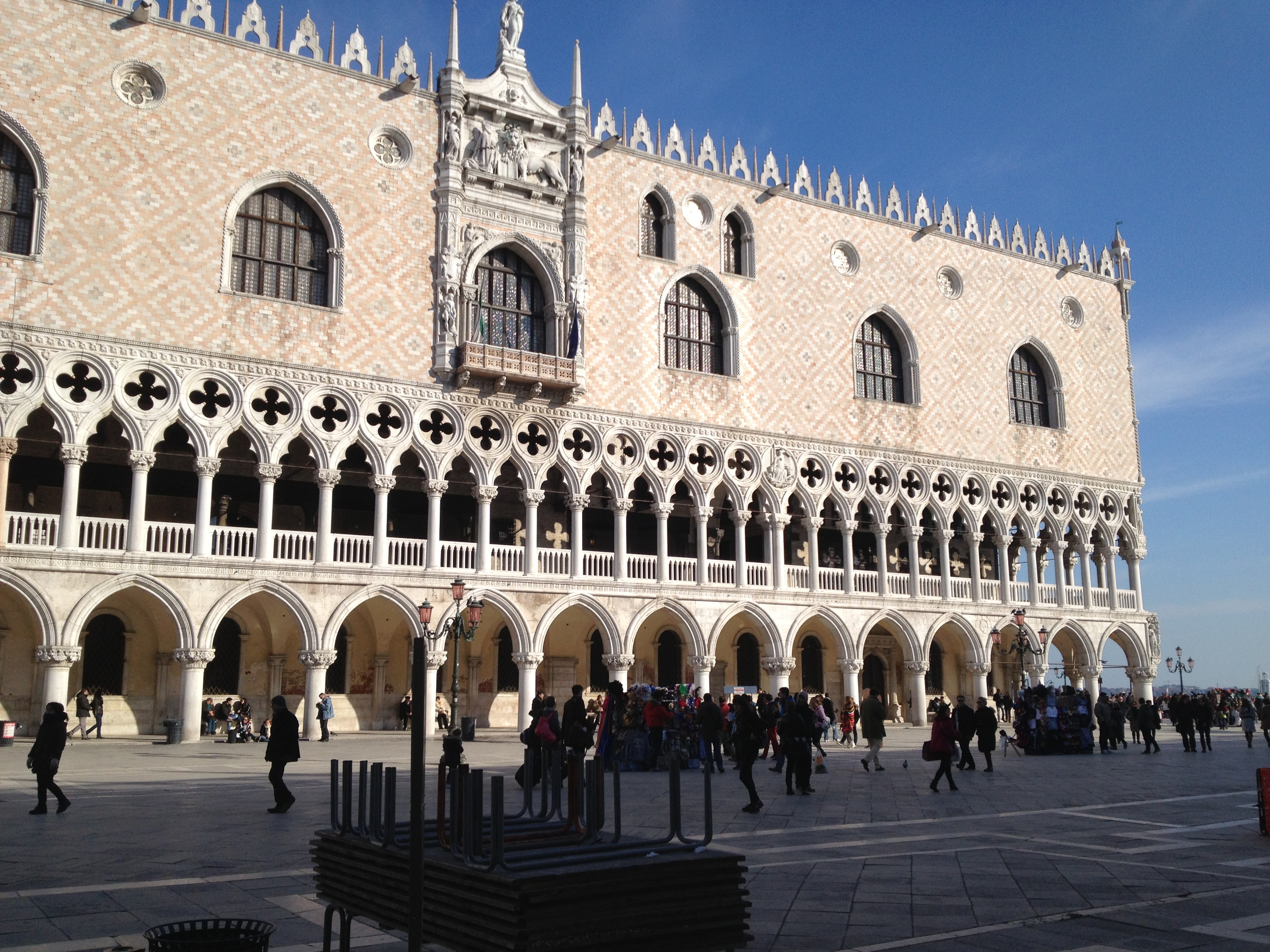 En fin de journée